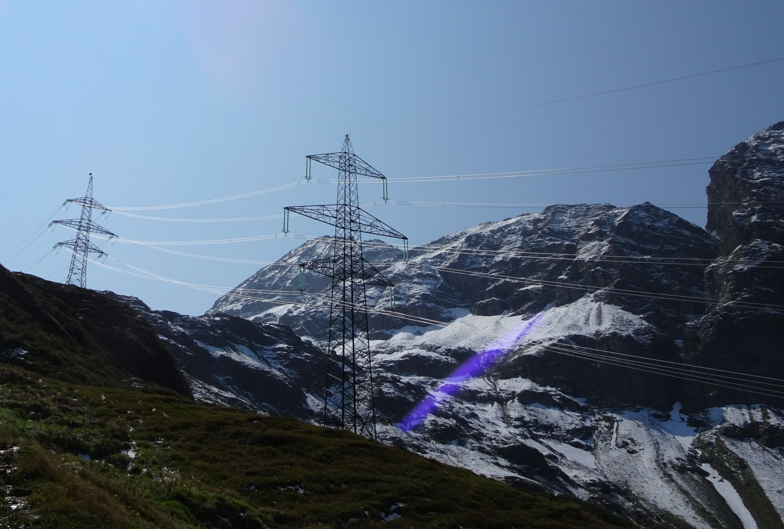 380-kV-Leitung im Felberntal